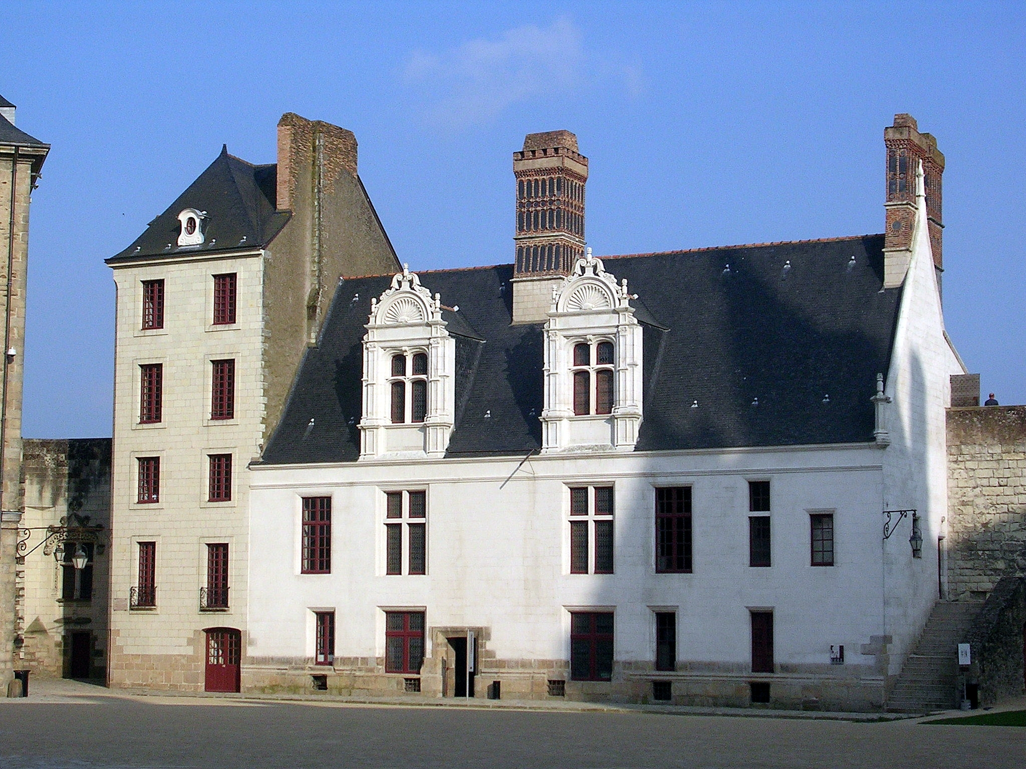 Château des ducs de Bretagne, le Petit Gouvernement, Nantes (France)